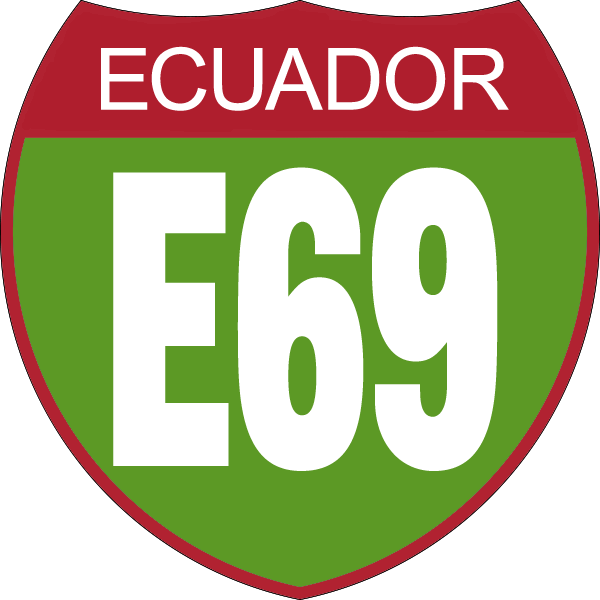 Disco de Identificación Ruta E69